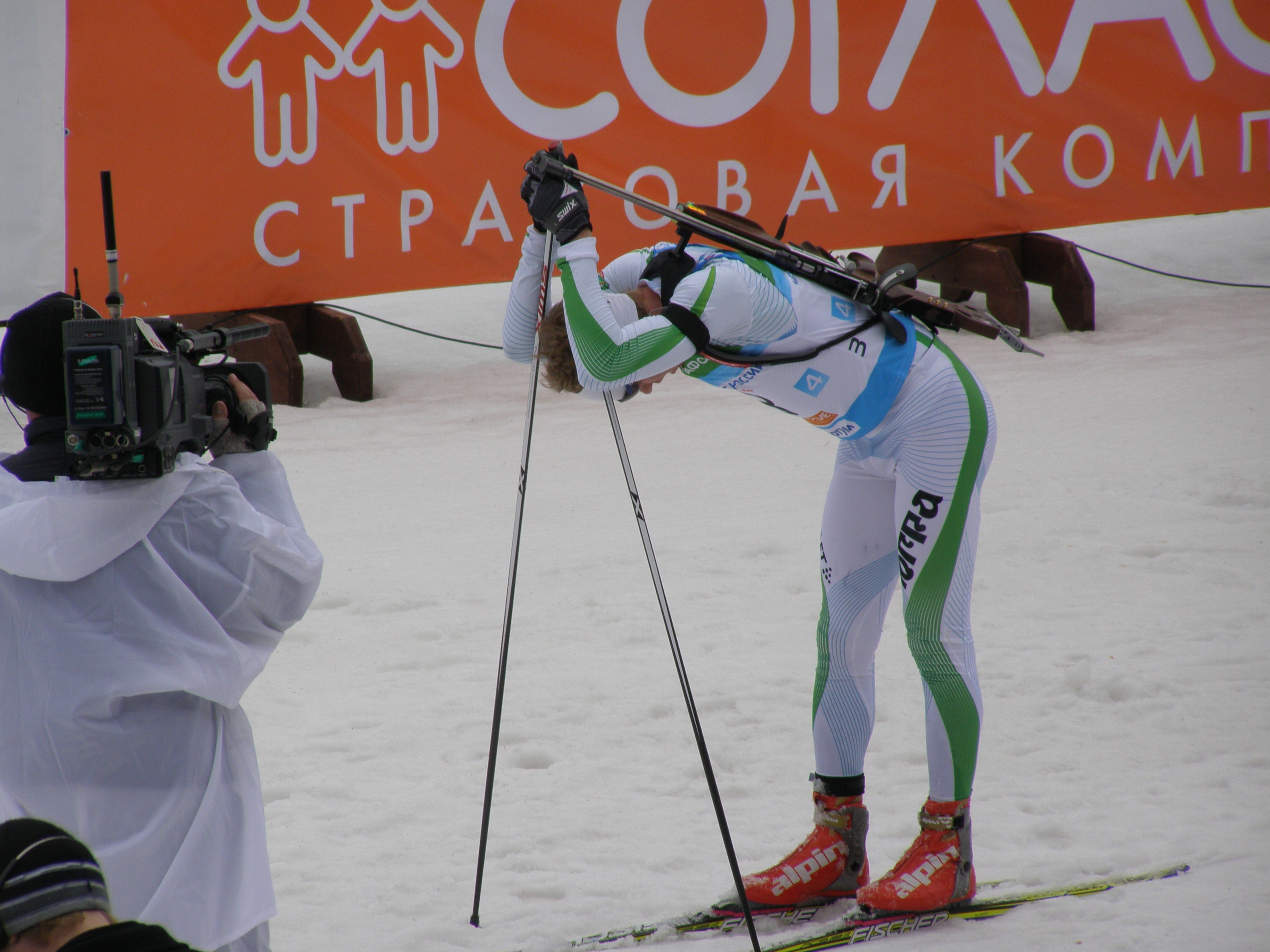 Ĉapmionkonkurso de Rusio pri Biatlono - 2012. La biatlona centro "Ĵemĉuĵina Sibiri" (Perlo de Siberio), Tjumena distrikto, Tjumena provinco, Rusio.